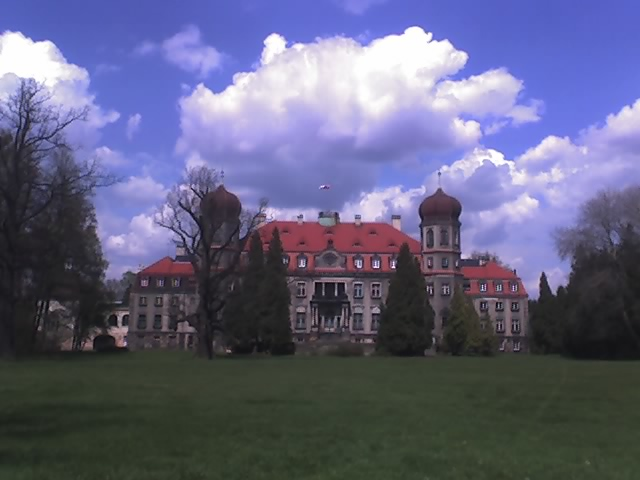 Brynek